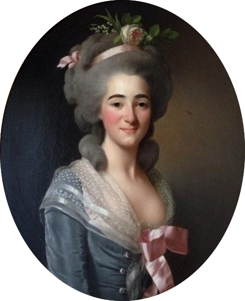 Portrait de Jeanne Begouen, née Mahieu, par Alexandre Roslin